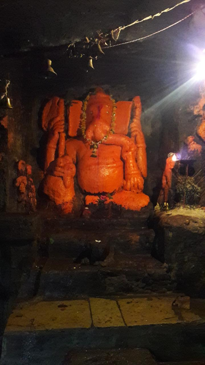 सोयगाव येथील गणेशलेणीतील छायाचित्र.